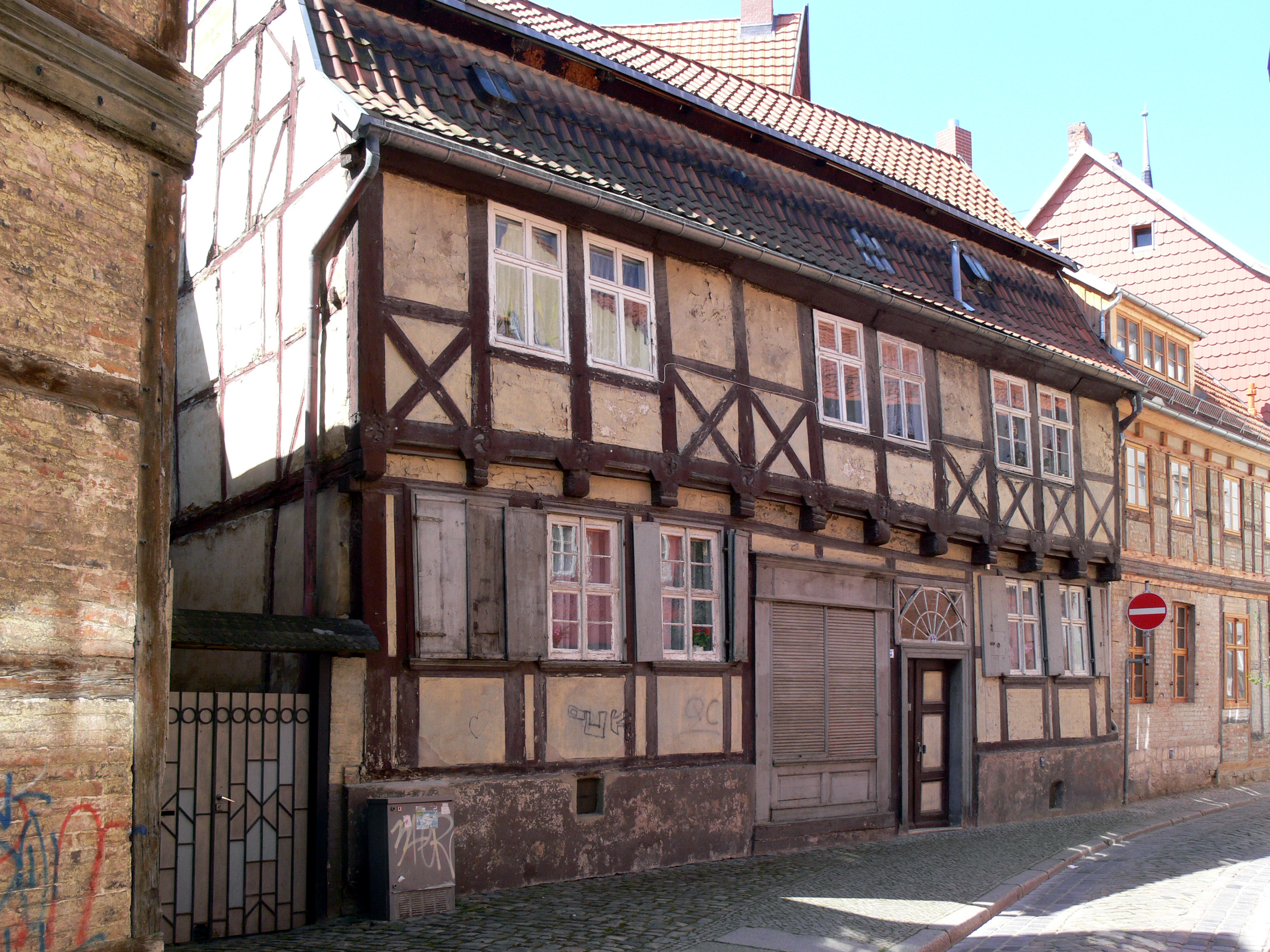 Haus Pölle 45 in Quedlinburg.